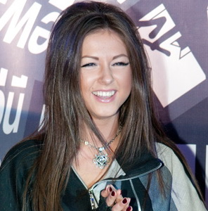 Нюша Шурочкина на праздновании 15-летия программы News Блок на MTV Россия